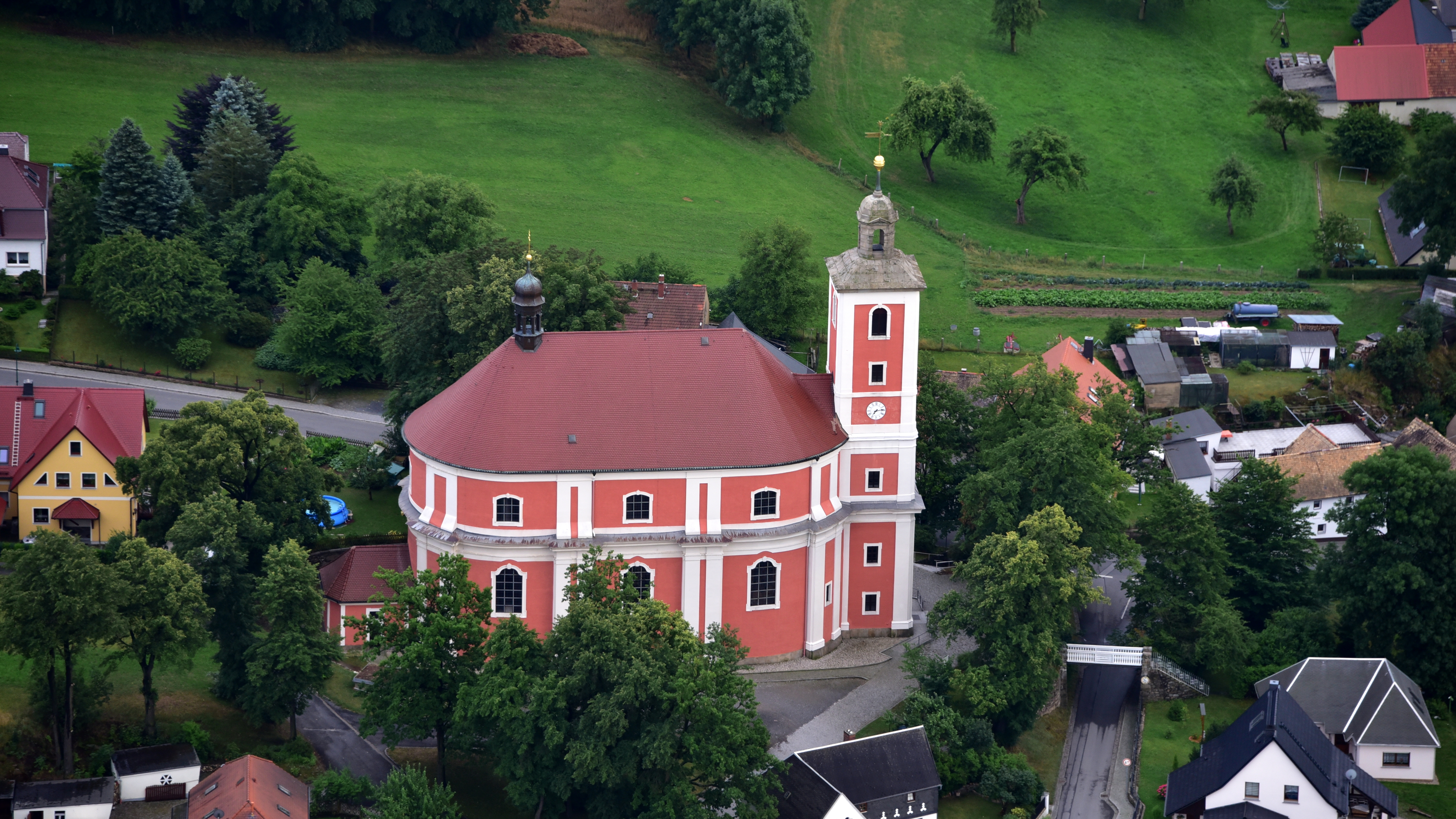 Katholische Pfarrkirche St. Martin, Nebelschütz: Luftaufnahme Hornjoserbsce: Powětrowy wobraz Cyrkwje swjateho Měrćina w Njebjelčicach